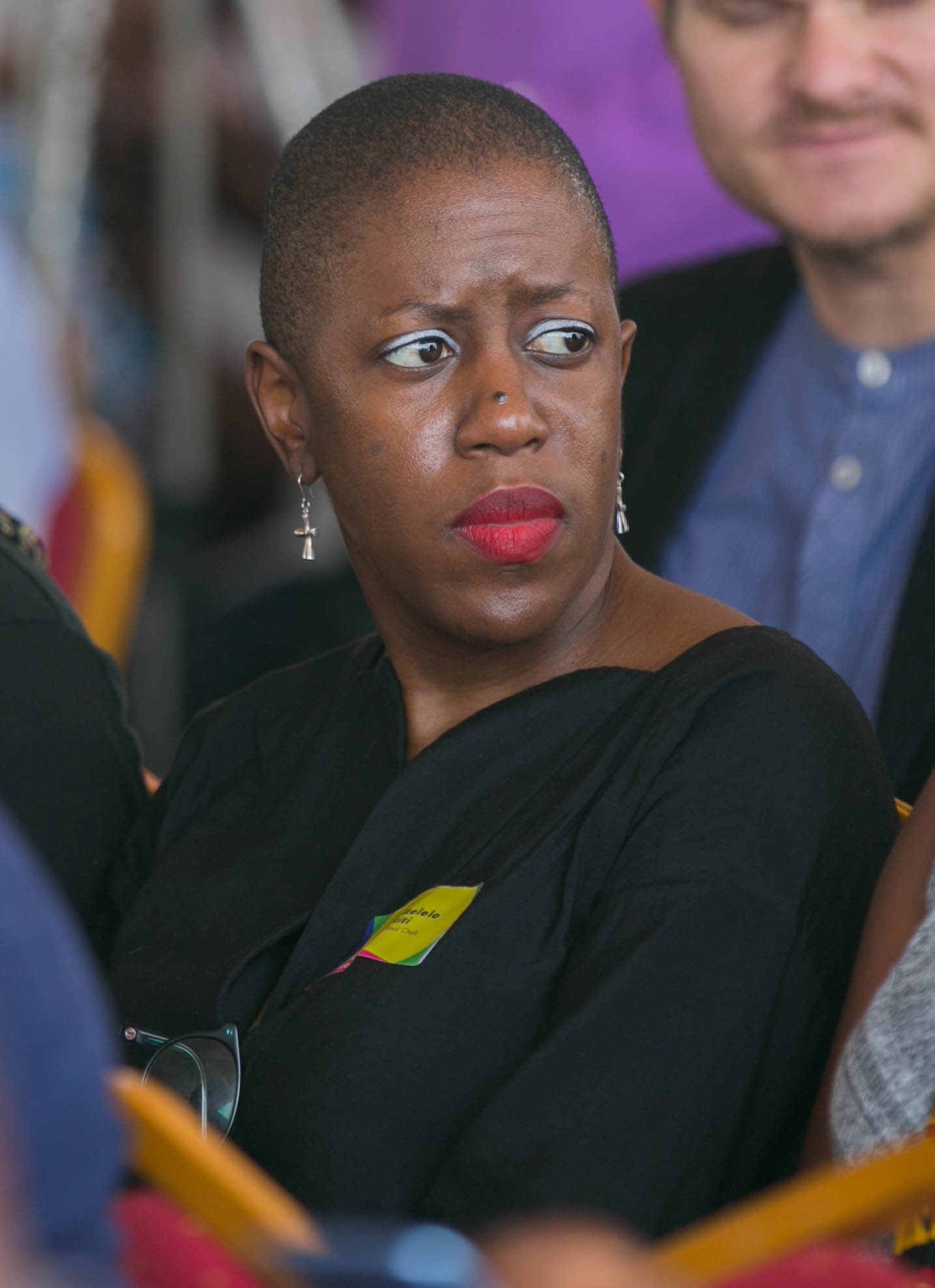 Photo: © Nana Afriyie